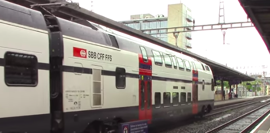 Entree stadler kiss